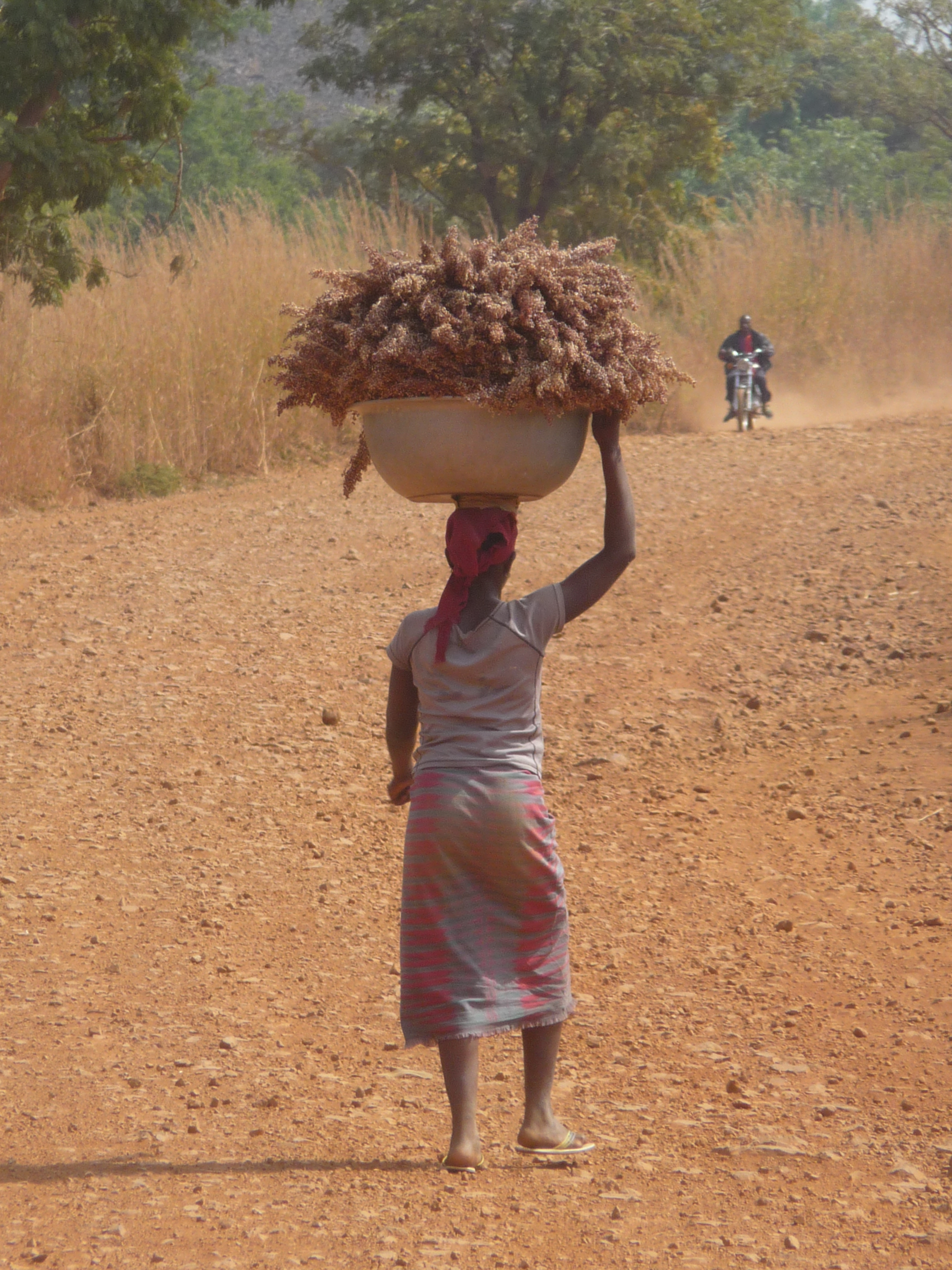 Au Burkina Faso, la condition sociale et les inégalités sont visibles dans les transports : les femmes transportent à pieds et les hommes sont motorisés. This is an image with the theme "Africa on the Move or Transport" from: Burkina Faso